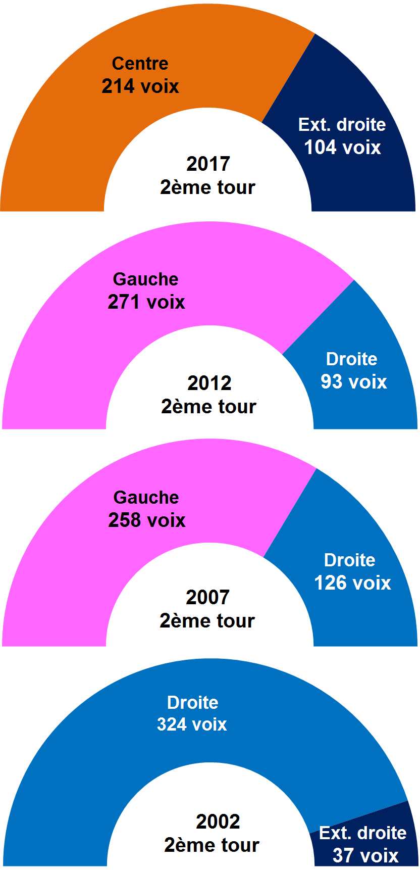 Résultatas 2nds tours présidentielles Avezac-Prat-Lahitte